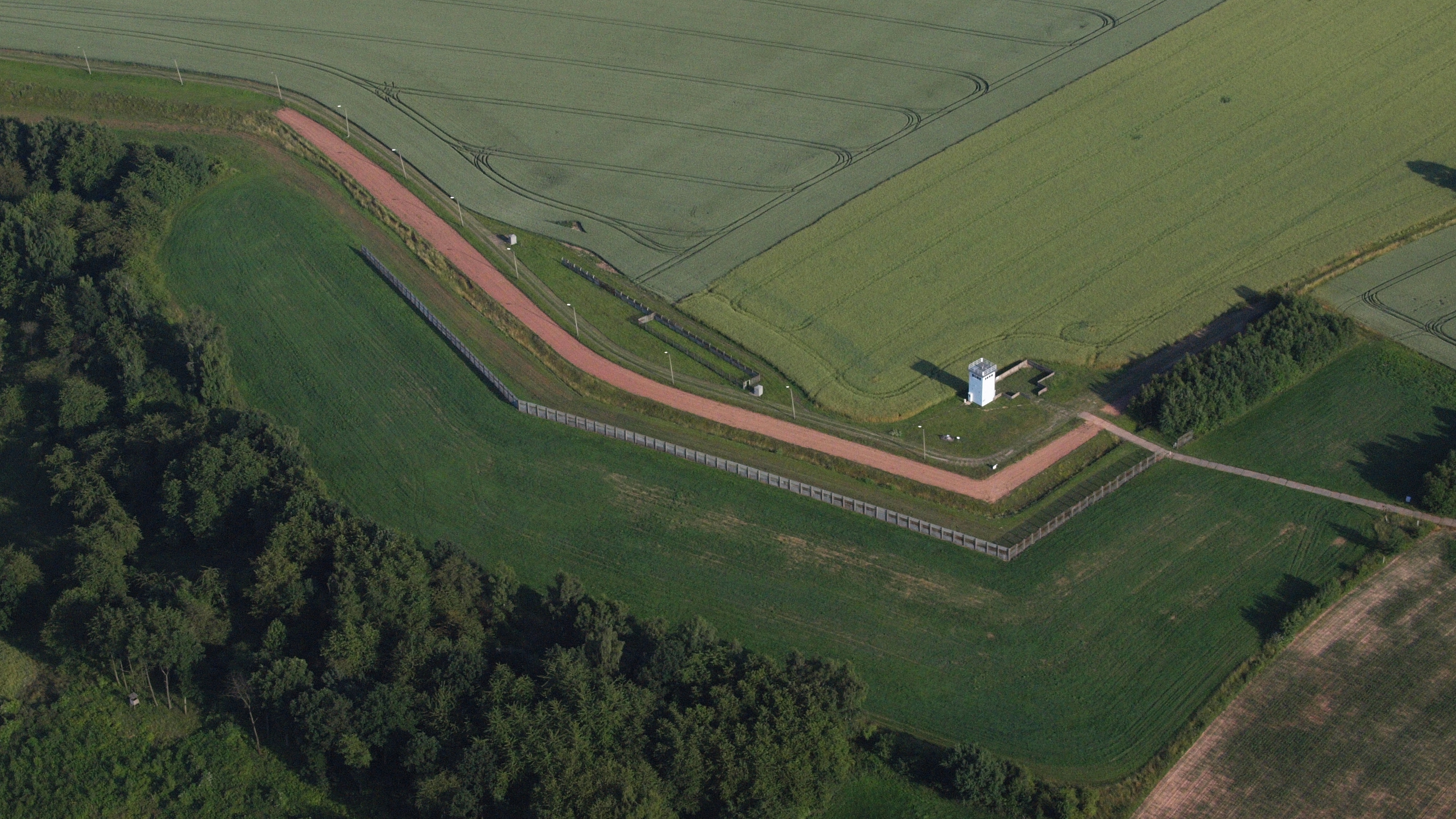 Grenzlandmuseum Teistungen / Eichsfeld: Luftaufnahme (Ergänzung: das Bild zeigt den ehemaligen Grenzabschnitt an der Führungsstelle auf dem südlichen Pferdeberg bei Teistungen im Eichsfeld, 1964 kam es hier zu einem Grenzzwischenfall, in dem Grenztruppen der DDR den Grenzverlauf ungefähr 100 m auf bundesdeutsches Gebiet verschieben wollten)